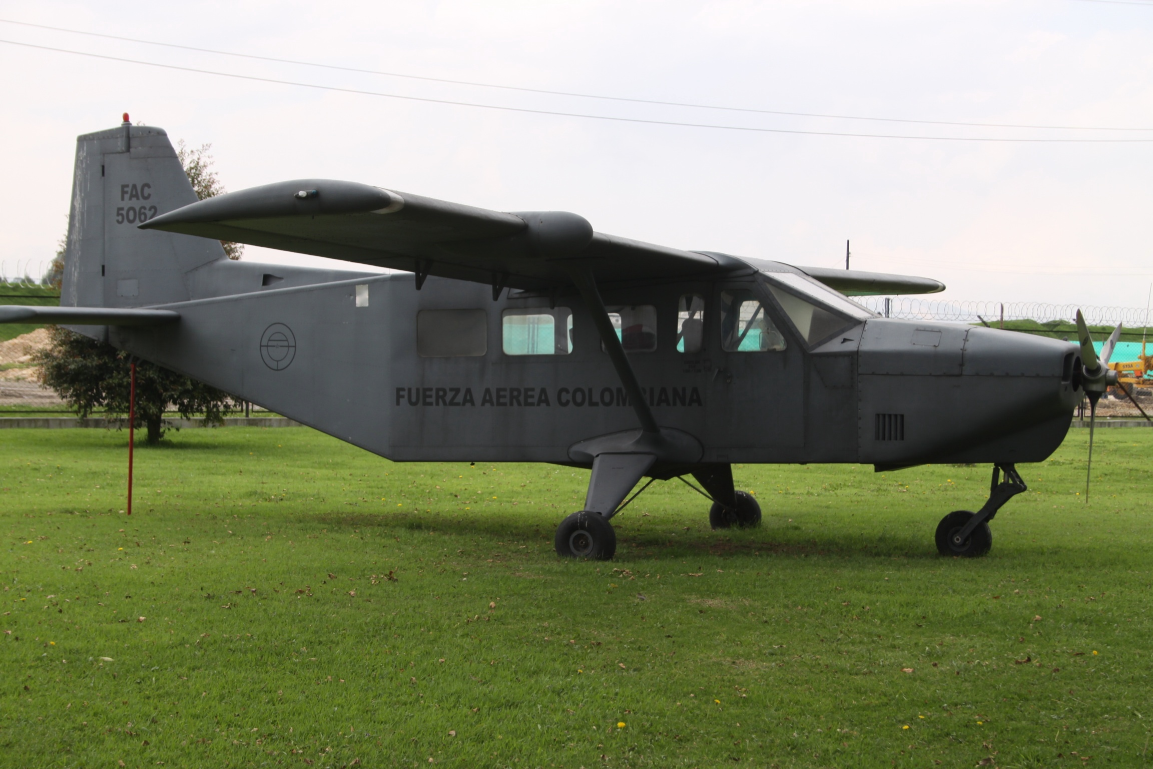 FAC5062 Gavilán G358M Fuerza Aerea Colombiana